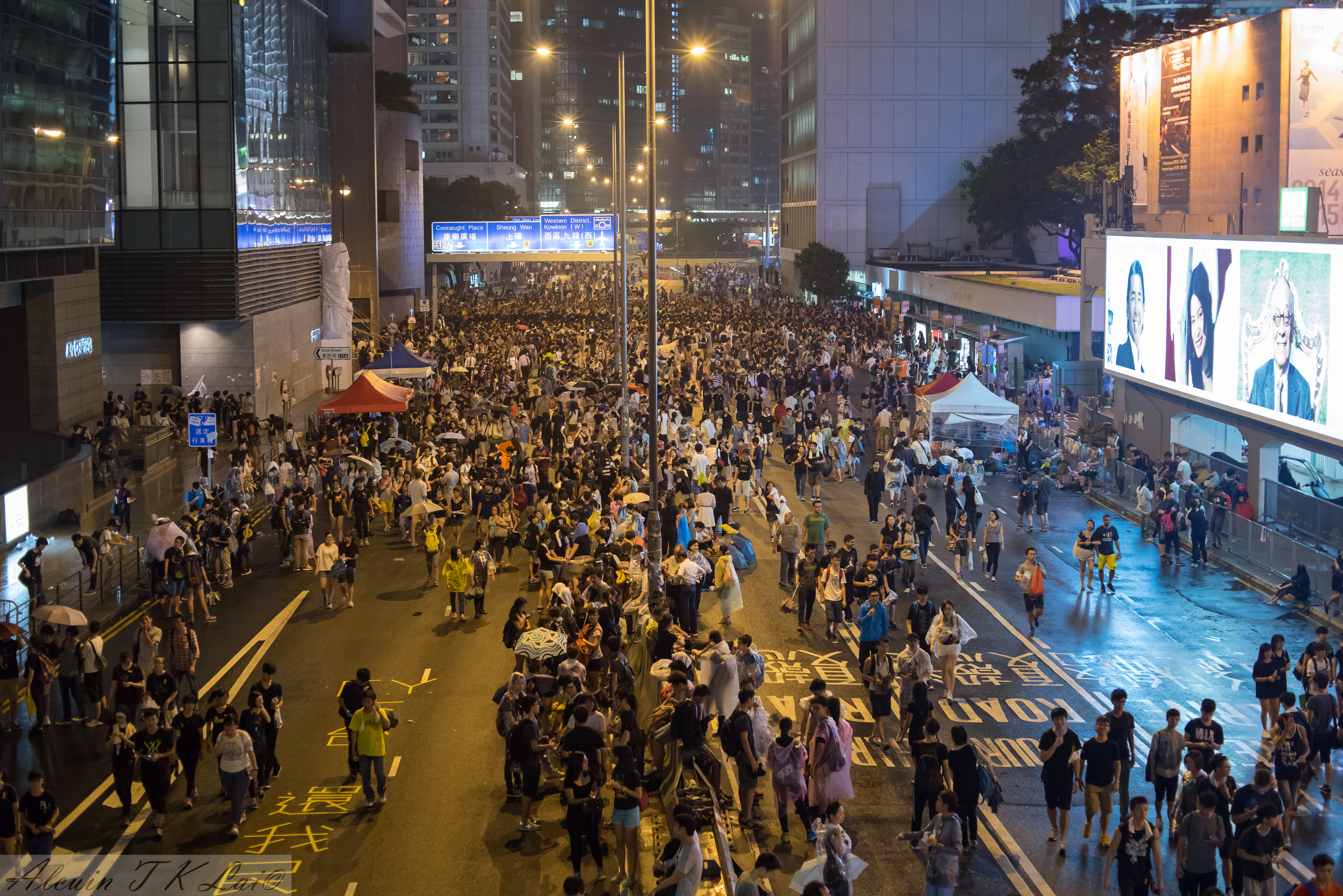 Umbrella Revolution in Central